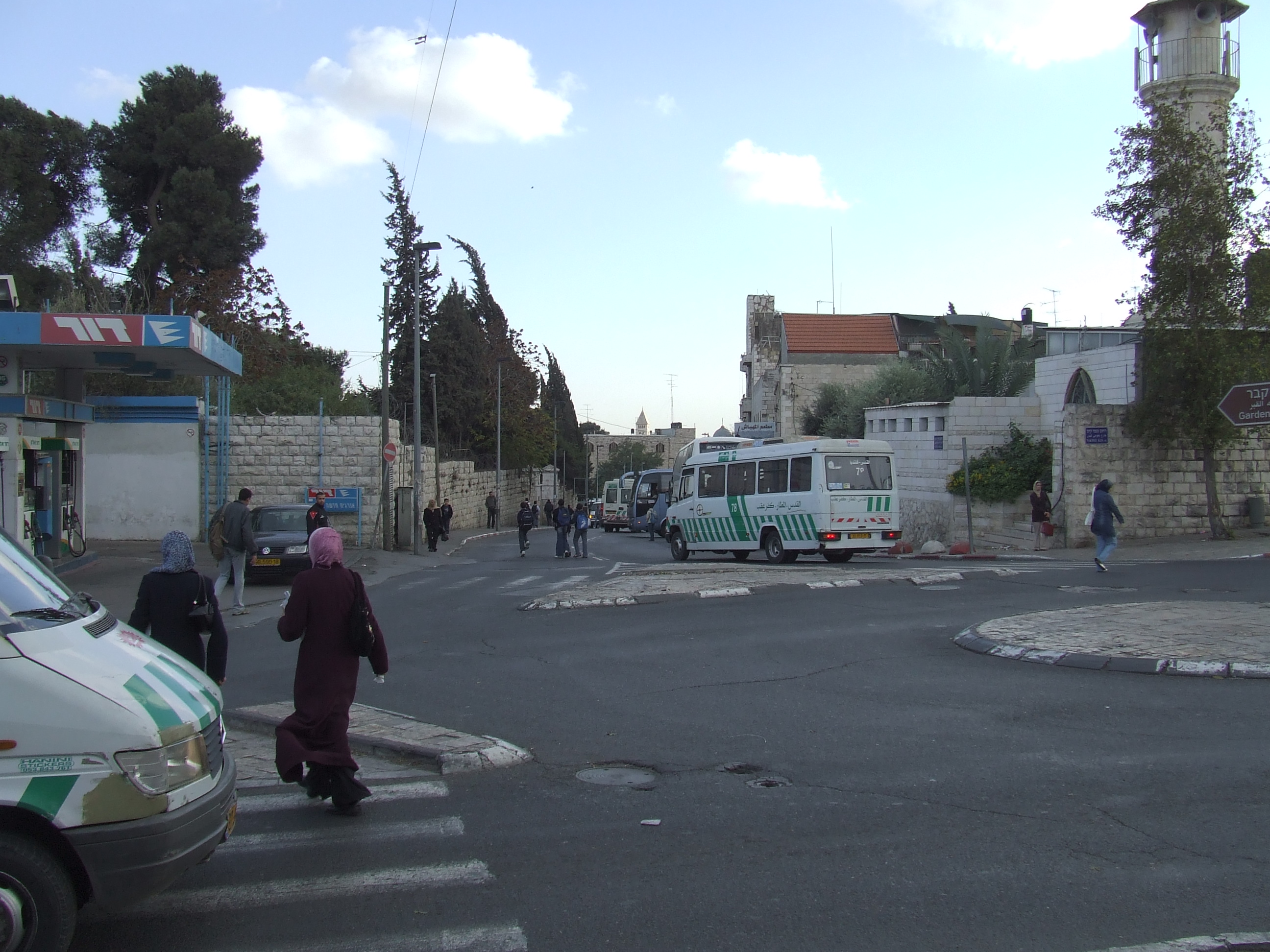 Jerusalem, Israel Jerusalem